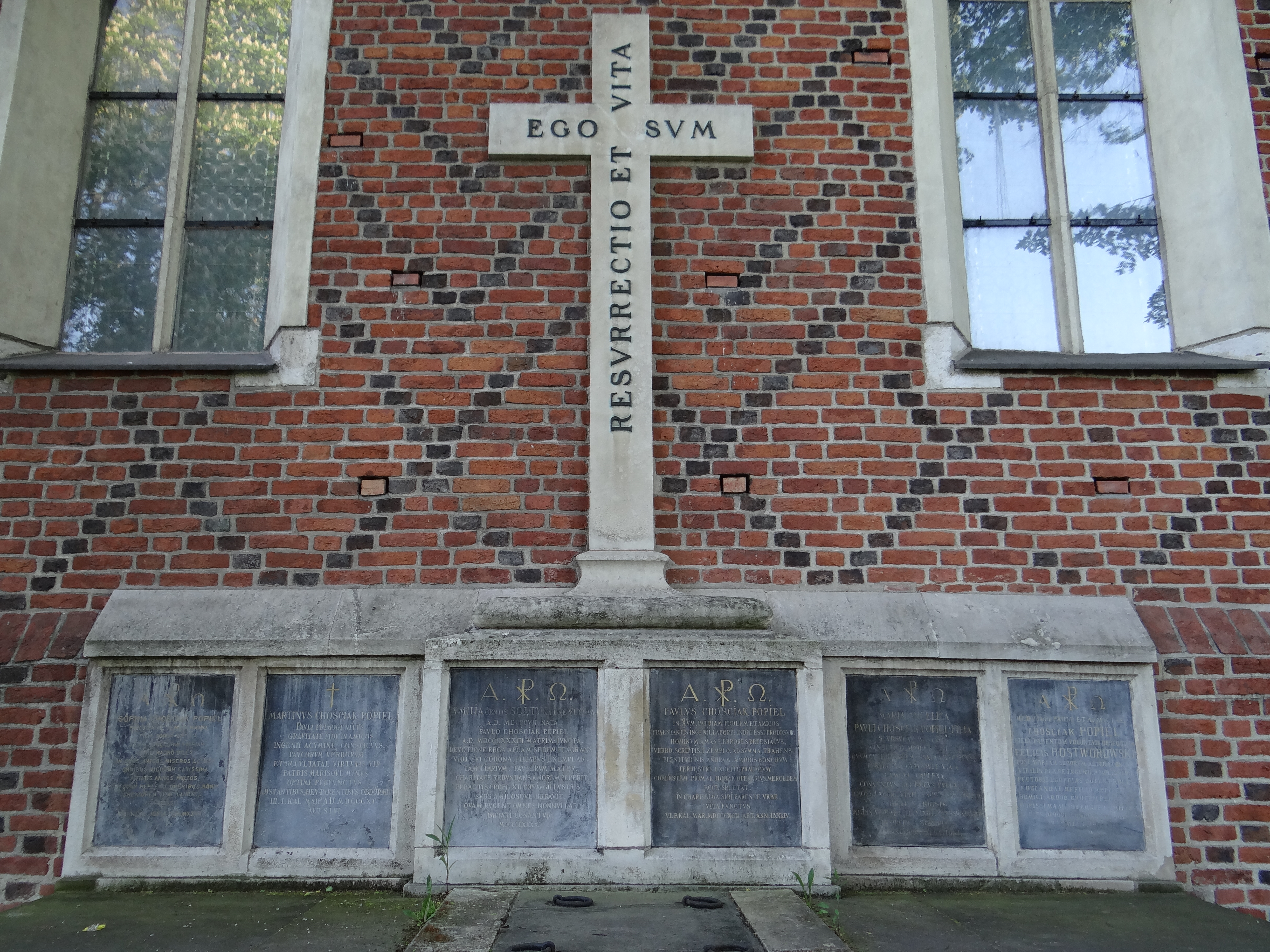 Kraków, kościół pw. św. Grzegorza, XIII, XV, XVII, 1925